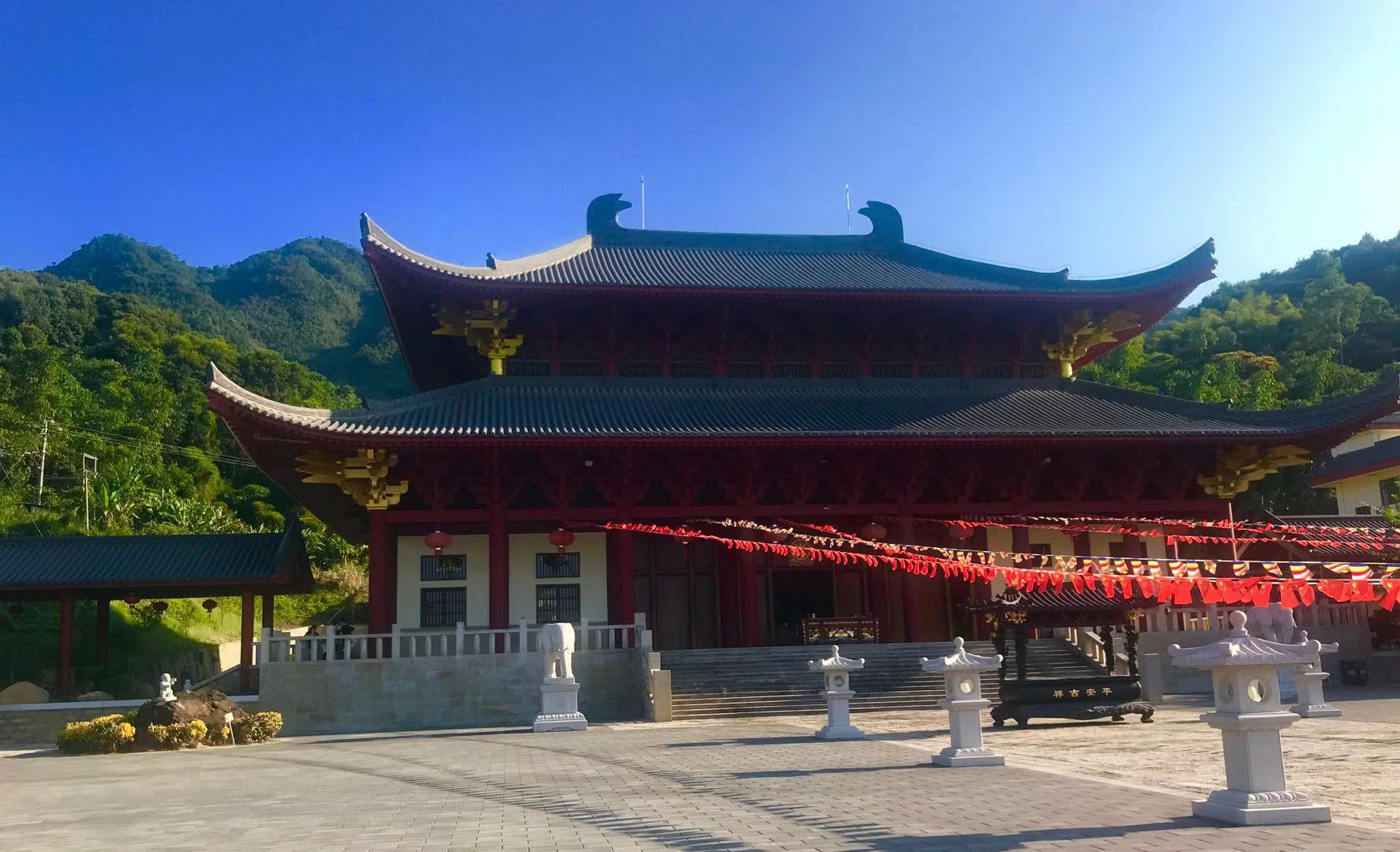 中文（中国大陆）: 南靖山城镇紫荆山紫云寺